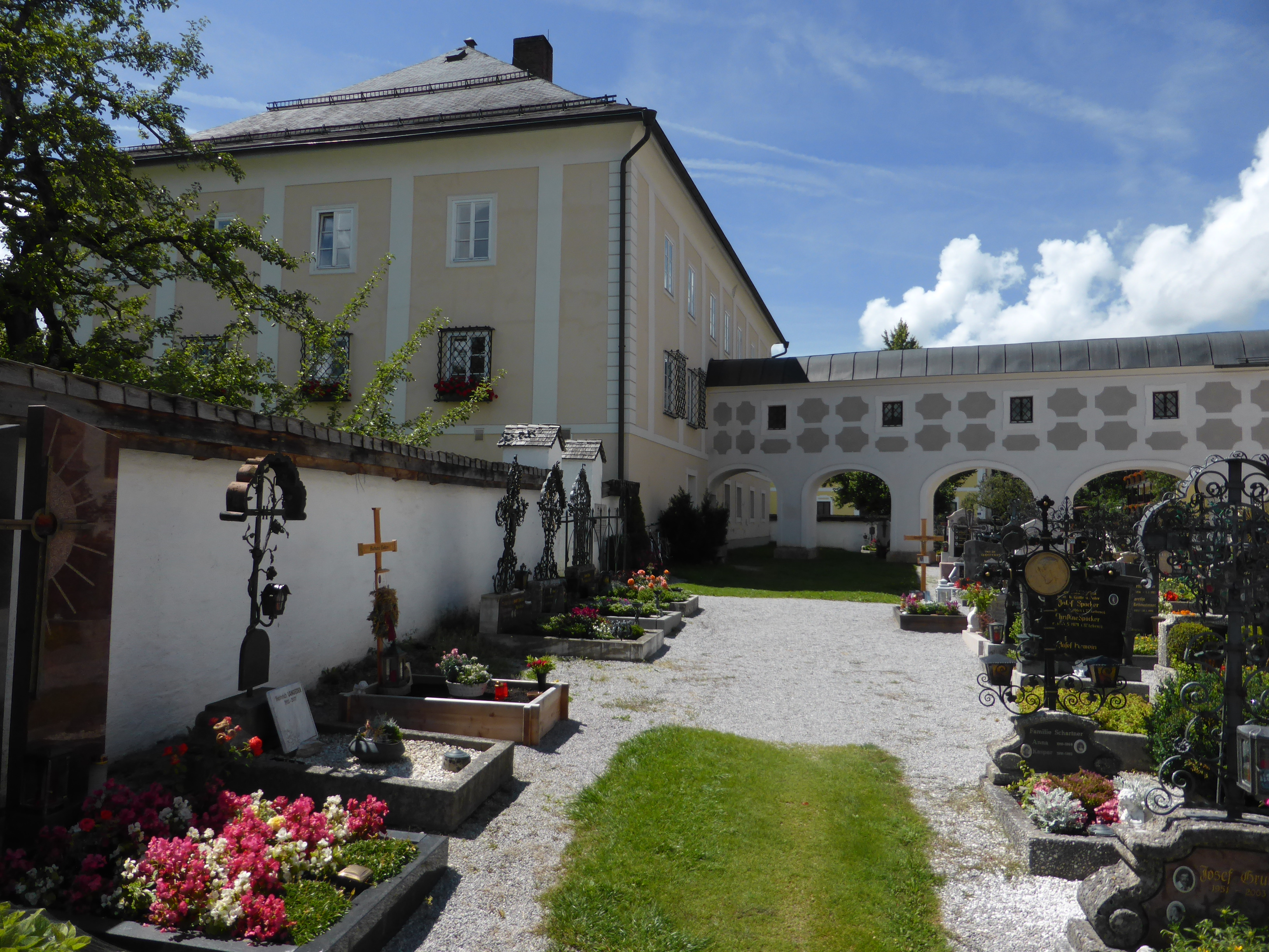 Pfarrhof